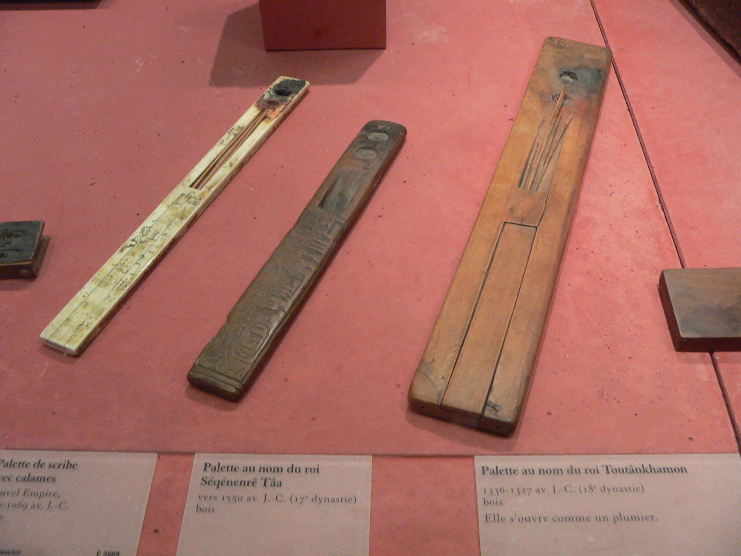 Palette de scribe avec calames, Nouvel Empire, 1550-1069 avant J.-C. - Palette au nom du roi Séqénenrê Tâa, vers 1550 avant J.-C. (17e dynastie). - Palette au nom du roi Toutânkhamon, 1336-1327 avant J.-C. (18e dynastie).